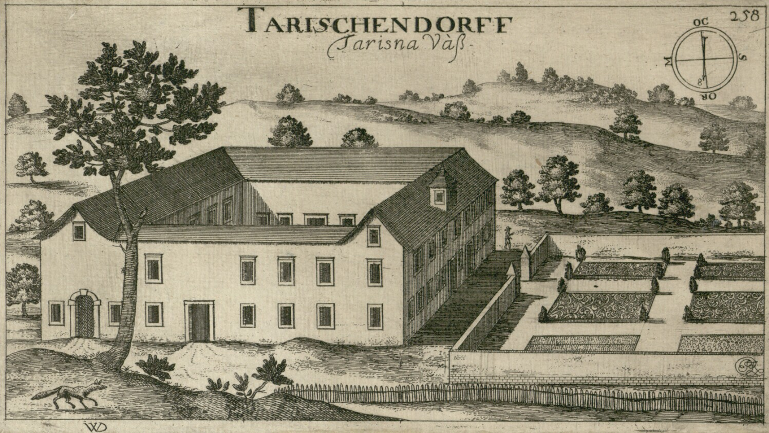 Tariški dvorec